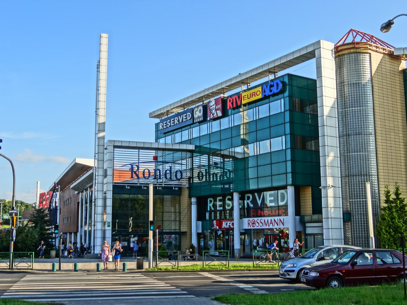 Centrum handlowe Rondo w Bydgoszczy przy ul. Kruszwickiej, zbud. w 1999 r.